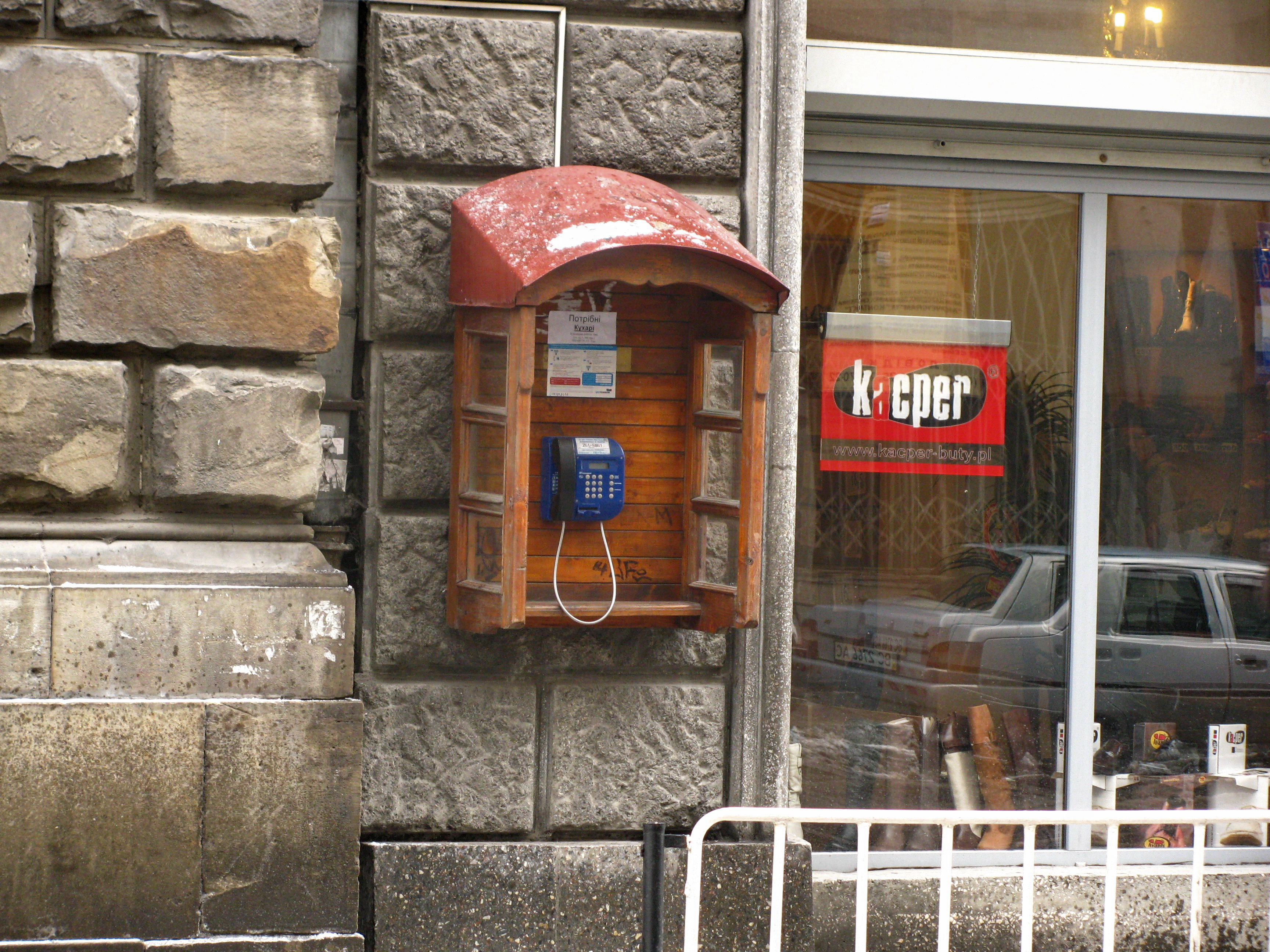 Телефонний автомат Львів.jpg: телефонний автомат у Львові на вулиці Гнатюка